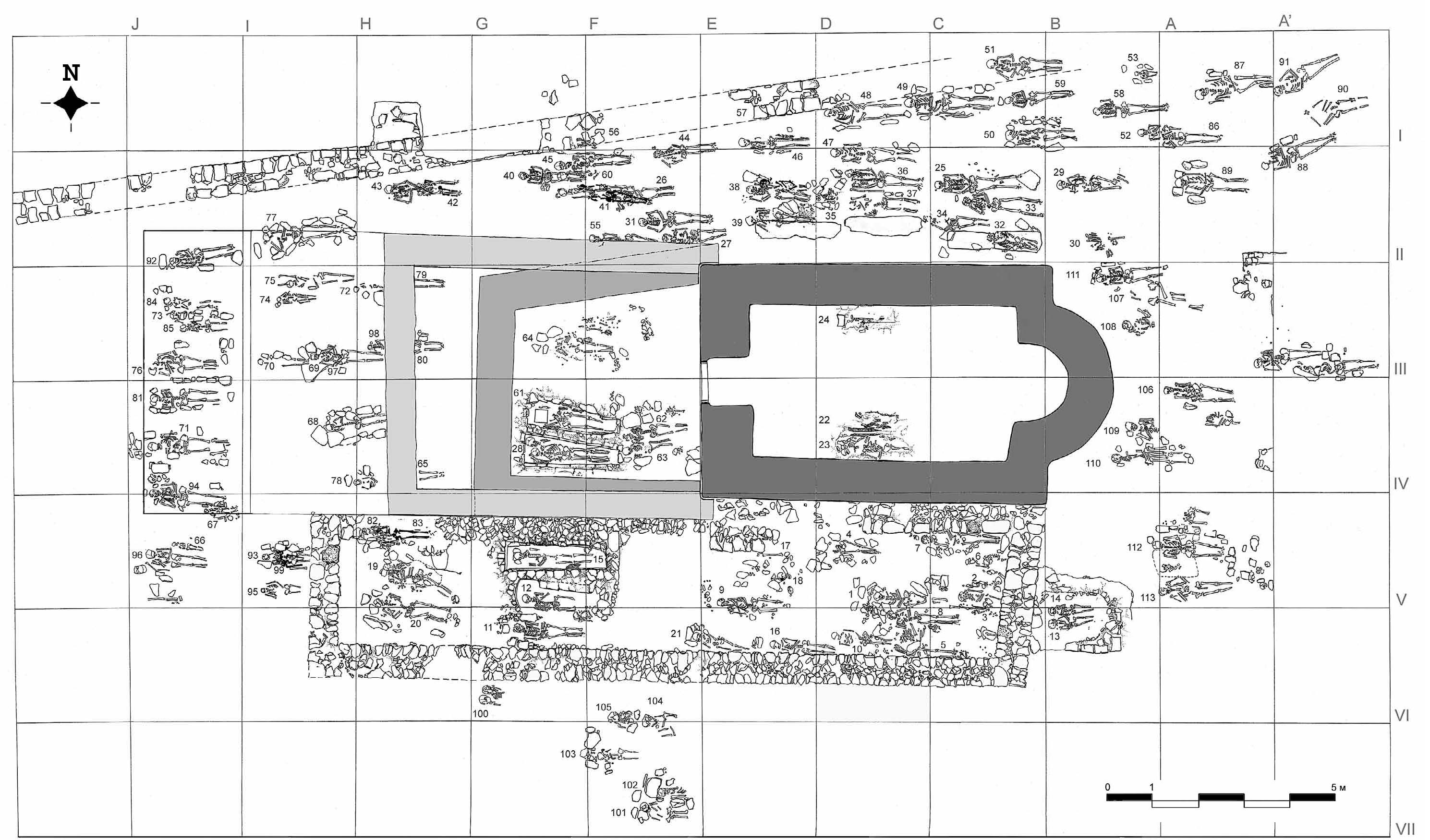 Скица зидова цркве Свете Петке у Станичењу